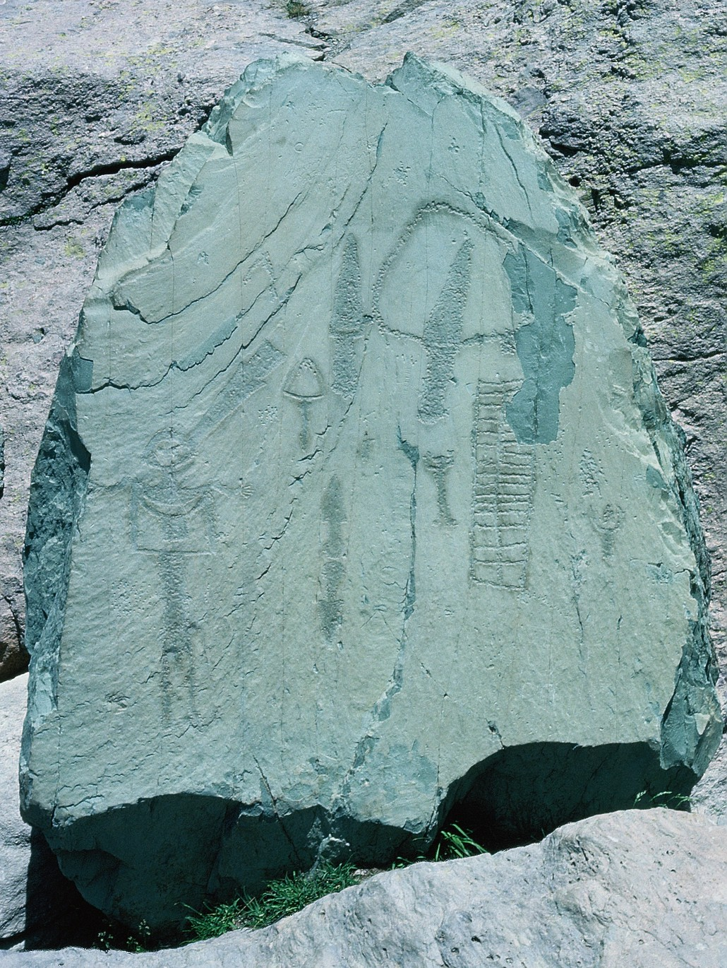 La Vallée des Merveilles, France. Le chef de tribu. Le parc mérite d’être cité en exemple : jusqu’à l’été 1989, l’accès de l’ensemble du site des Merveilles était resté totalement libre. Le parc a, très courageusement – après une campagne d’information et de concertation avec l’ensemble des acteurs - limité la liberté d’accès à des itinéraires précis. Les visiteurs peuvent toutefois s’écarter des parcours autorisés à condition d’être guidés par des accompagnateurs agréés. Parallèlement, l’un des monuments essentiels de cette zone, la fameuse dalle du chef de tribu, a été enlevé par héliportage, soigneusement mis à l’abri dans un musée et remplacé par un moulage. On peut encore découvrir in situ la dalle de l’autel et le Christ. Par contre, le sorcier et la stèle du couple primordial sont désormais situés dans la zone réglementée de la vallée des Merveilles. Si ces principes de protection étaient perdus de vue, les désirs immédiats d’usage risquent de sacrifier l’objectif de conserver les monuments comme valeurs vivantes dans la conscience des générations futures.